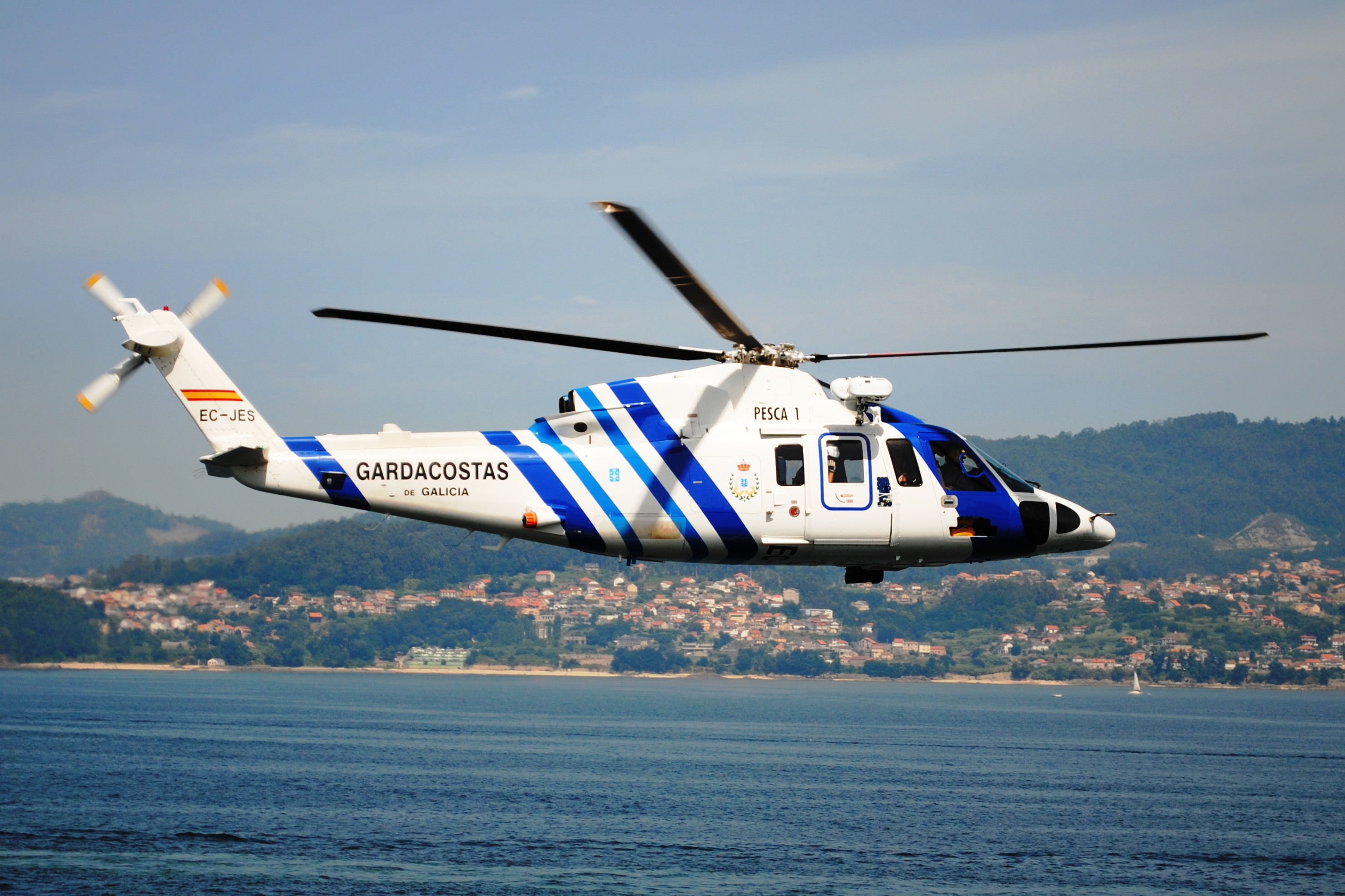 'Pesca 1' en Vigo dende a cuberta 6 do Grand Voyager.